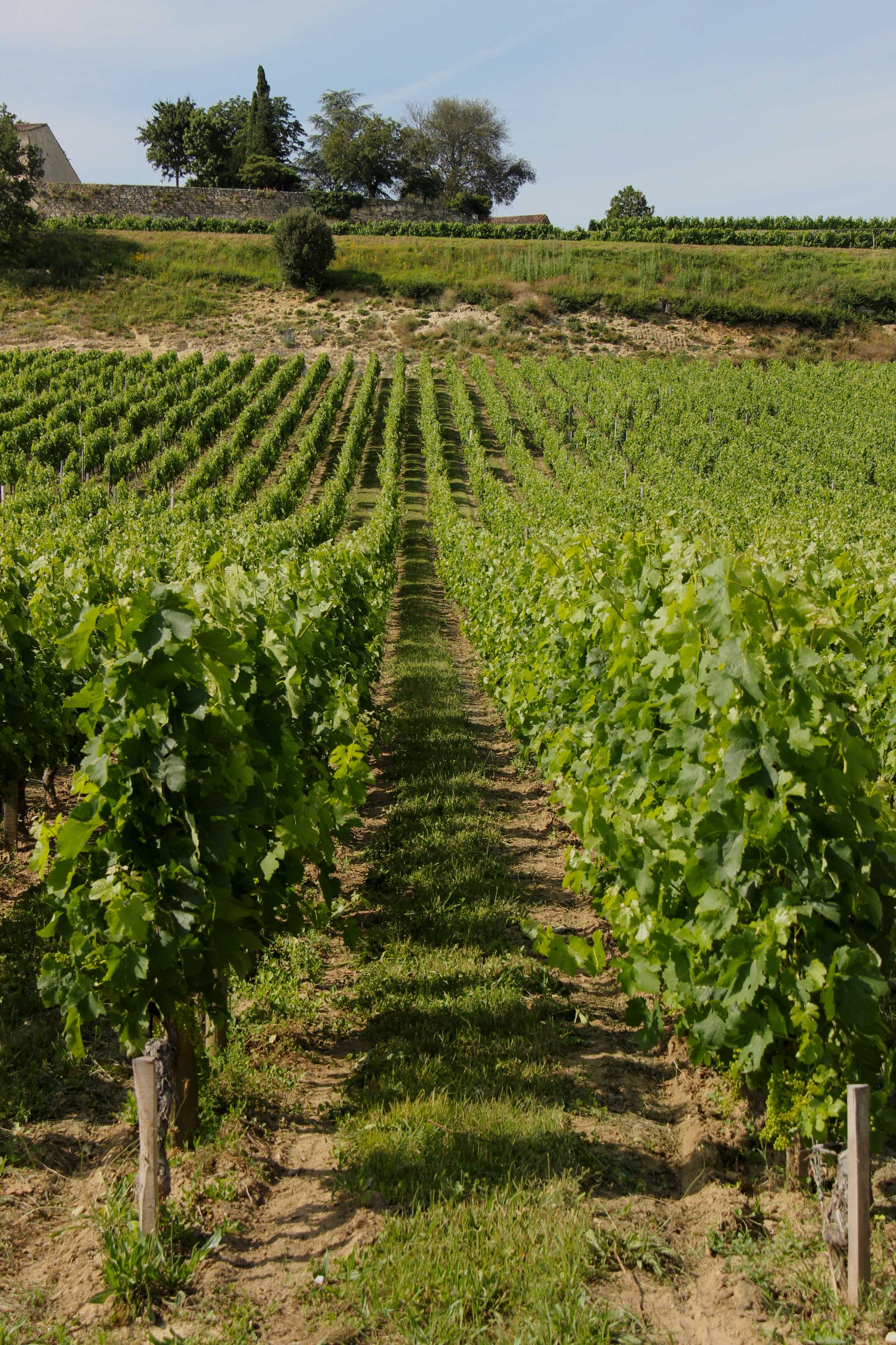 Domaine du Tertre Daugay, Saint Emilion, France